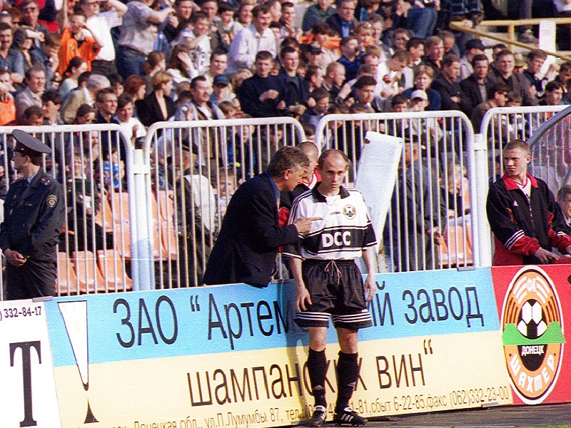 Фотография с диска Анастасии Федоренко «Донецк. Увидеть и полюбить». ФК «Шахтёр» Донецк